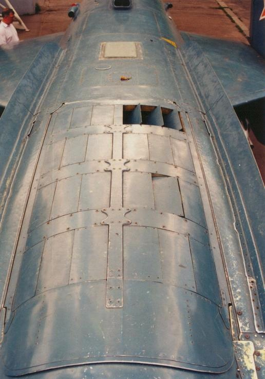 Yakovlev Yak-38 VTOL fighter